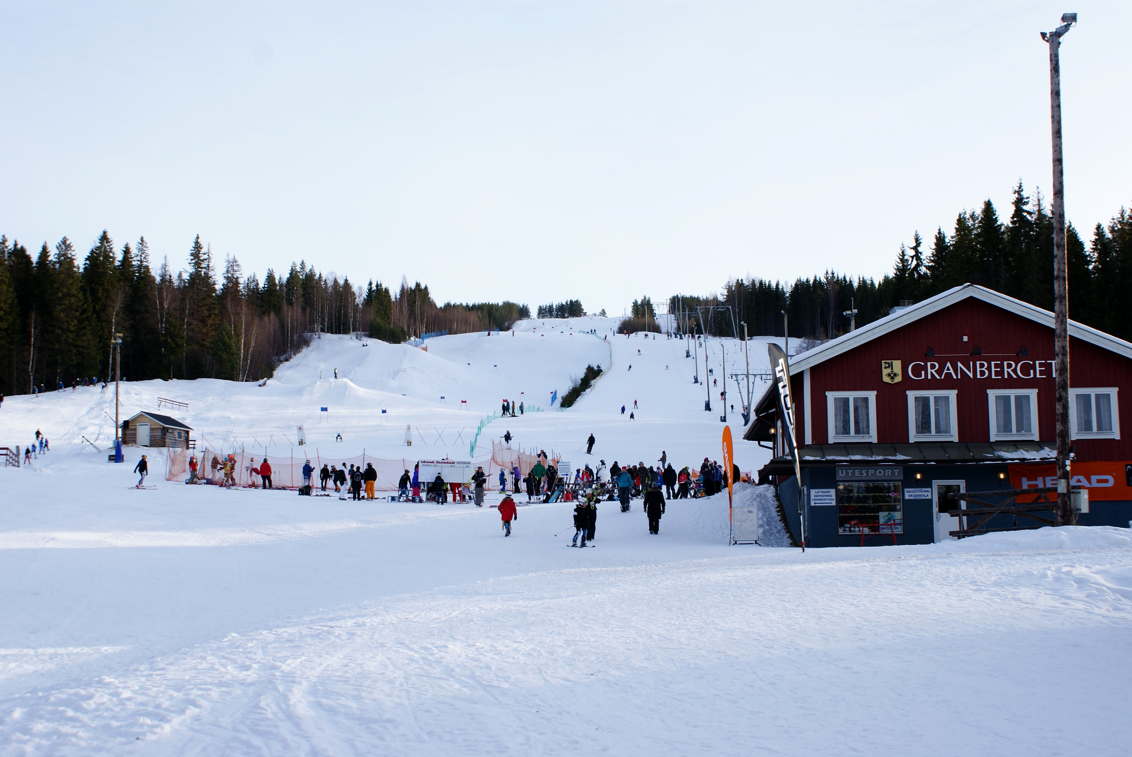 Skidbackes Granberget i Leksands kommun, januari 2011.